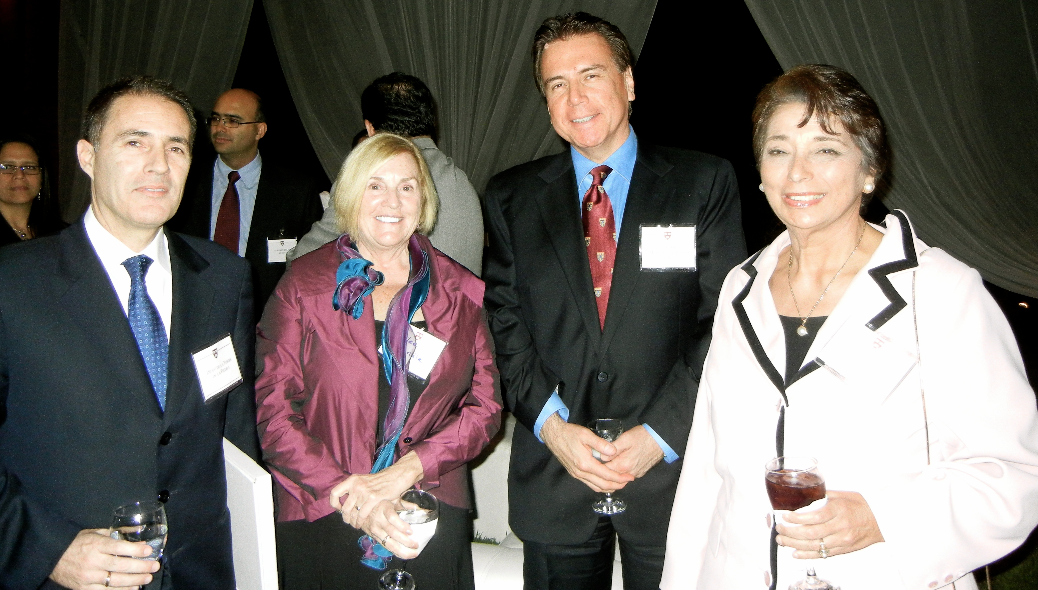 Diego de la Torre, Merilee Grindle, Víctor M. Marroquín and Beatriz Merino